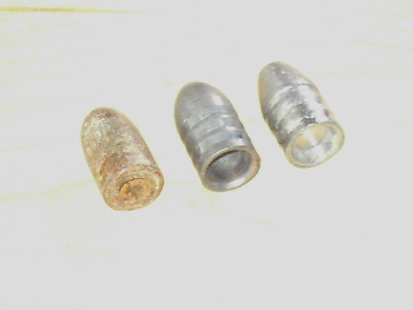 Enfield-Vorderlader von links nach rechts: Original von der Krim, mit drei Fettrillen wie im amerikan. Buergerkrieg bzw. in der Boxerhuelse und modernes Geschoß wie es Sportschuetzen verwenden mit flachem Hohlboden, liegend